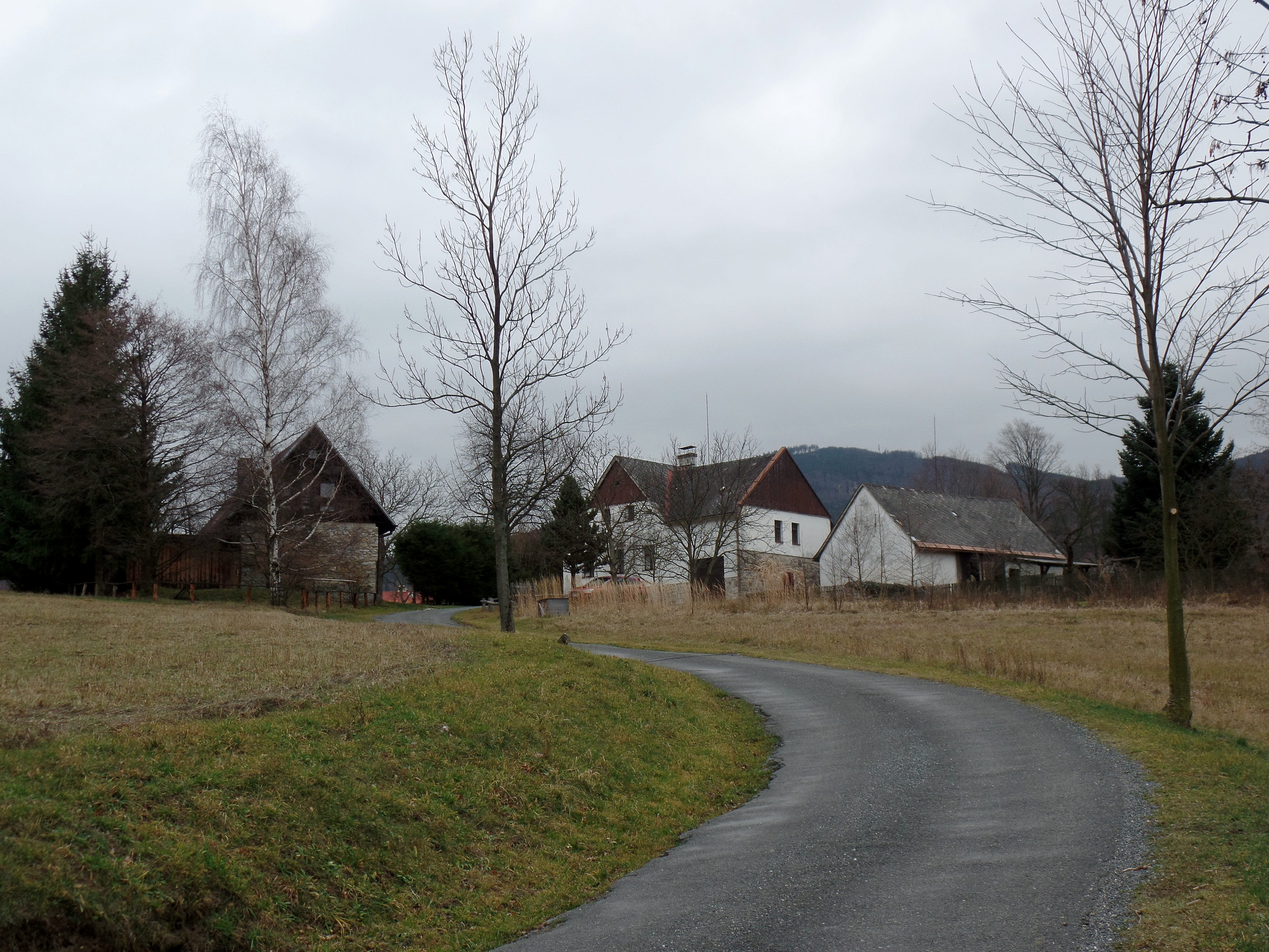 Staré Podhradí część miejscowości (Černá Voda)